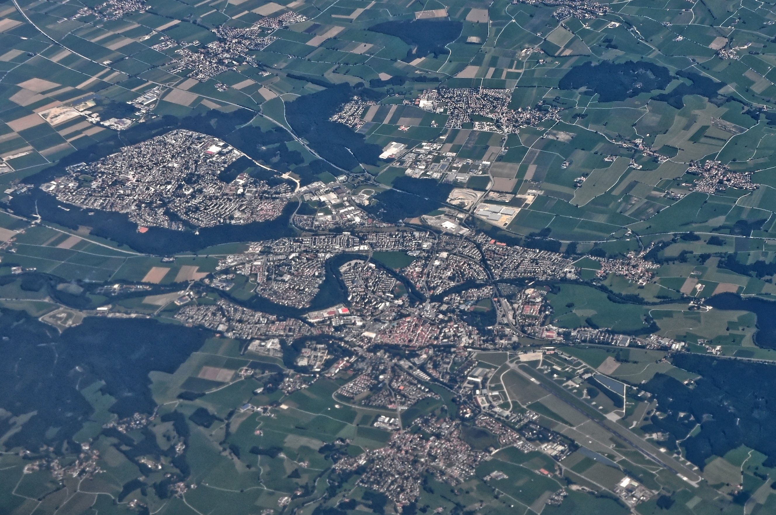 Bilder vom Flug -Rom-Düsseldorf-Hamburg 2013 Dieses Foto entstand in Zusammenarbeit mit Stadtbesichtigungen.de Die Seiten Stadtbesichtigungen.de, der dazugehörige Reise Blog sowie die Facebookseite: Stadtbesichtigungen Rom dürfen dieses Bild für Ihre Veröffentlichungen ohne den Hinweis auf Wikipedia, Commons bzw der Lizenz verwenden. Die Verantwortlichen habe von mir (Ra Boe) die Originaldaten zur freien Verfügung übermittelt bekommen.